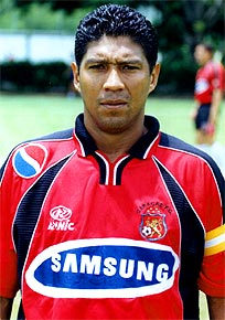 Stalin Rivas defendiendo los colores del Caracas FC.